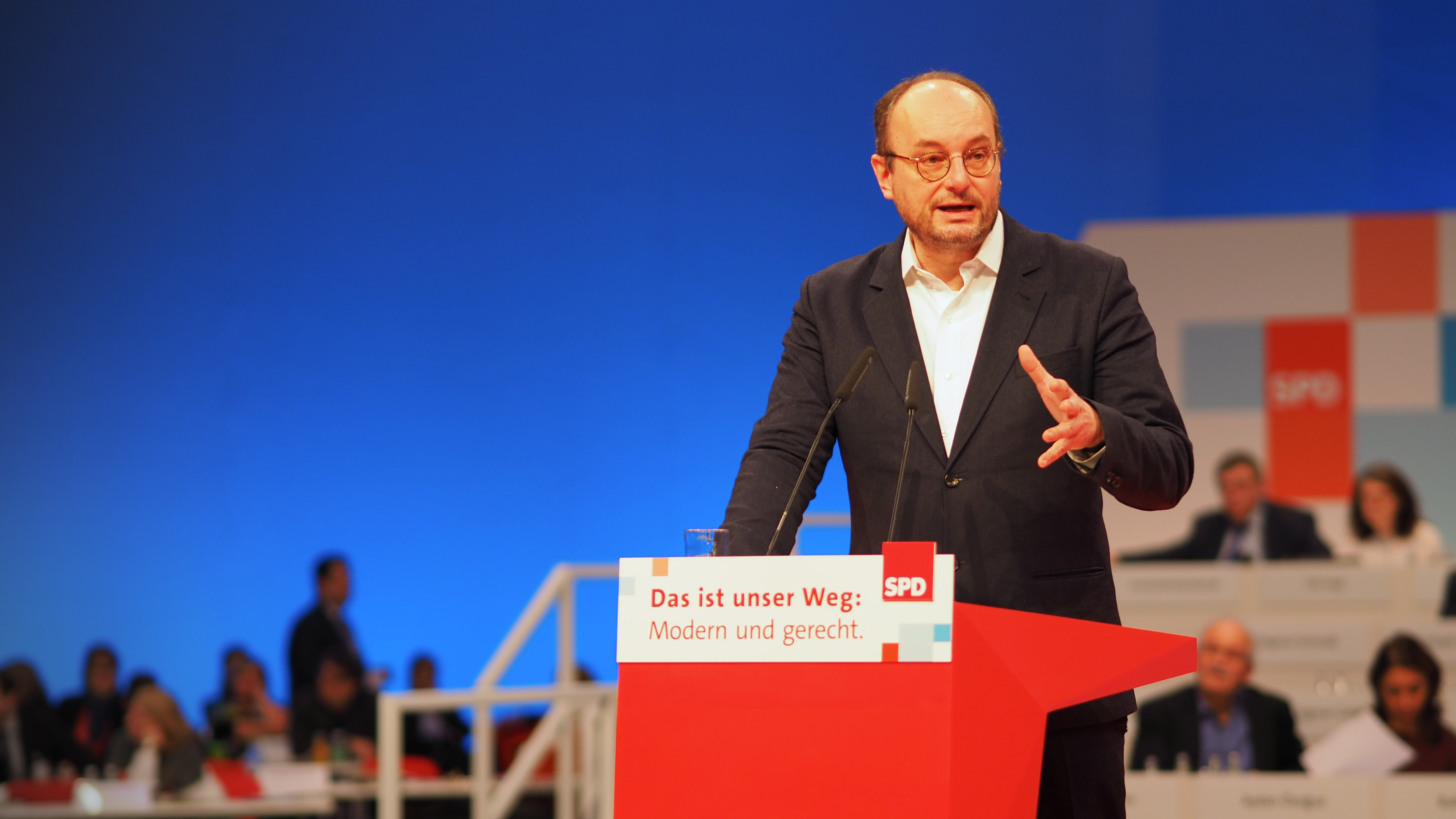 Journalist Nils Minkmar als Gastredner zum Thema "Europa" auf dem SPD Parteitag 2017